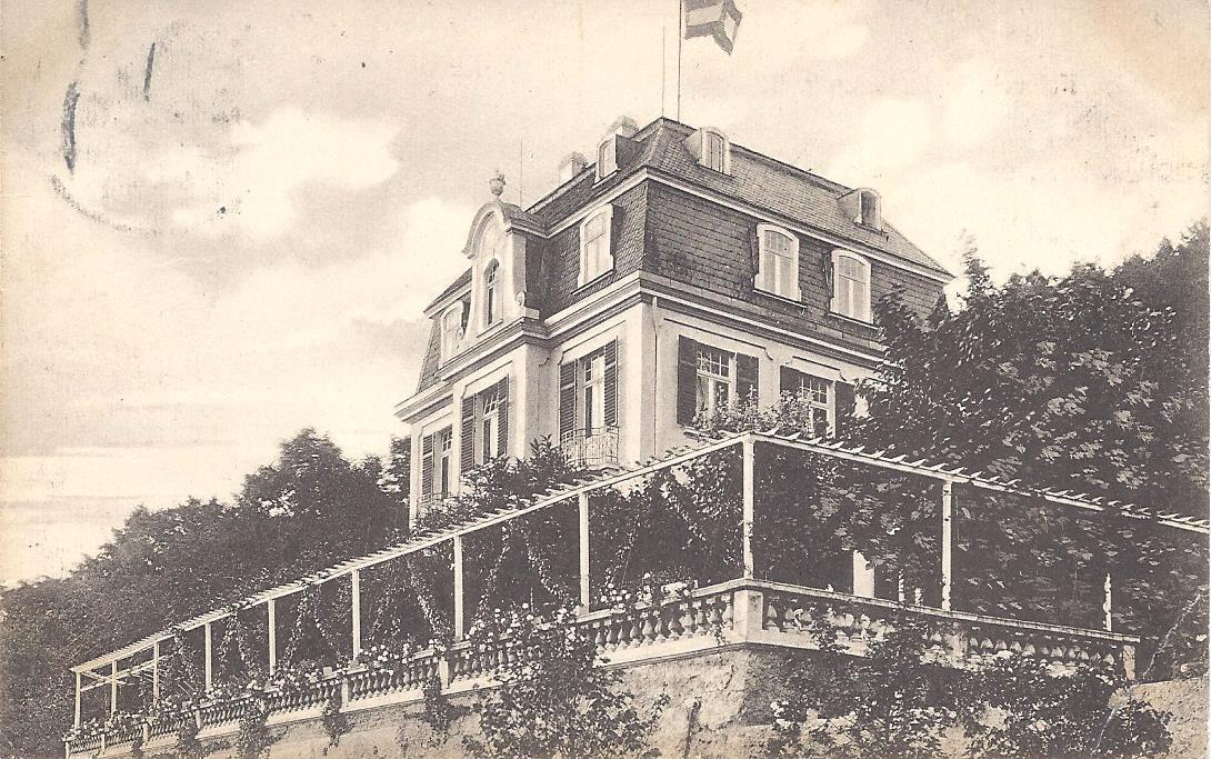 Historische Darstellung von Haus Felseck (um 1907)